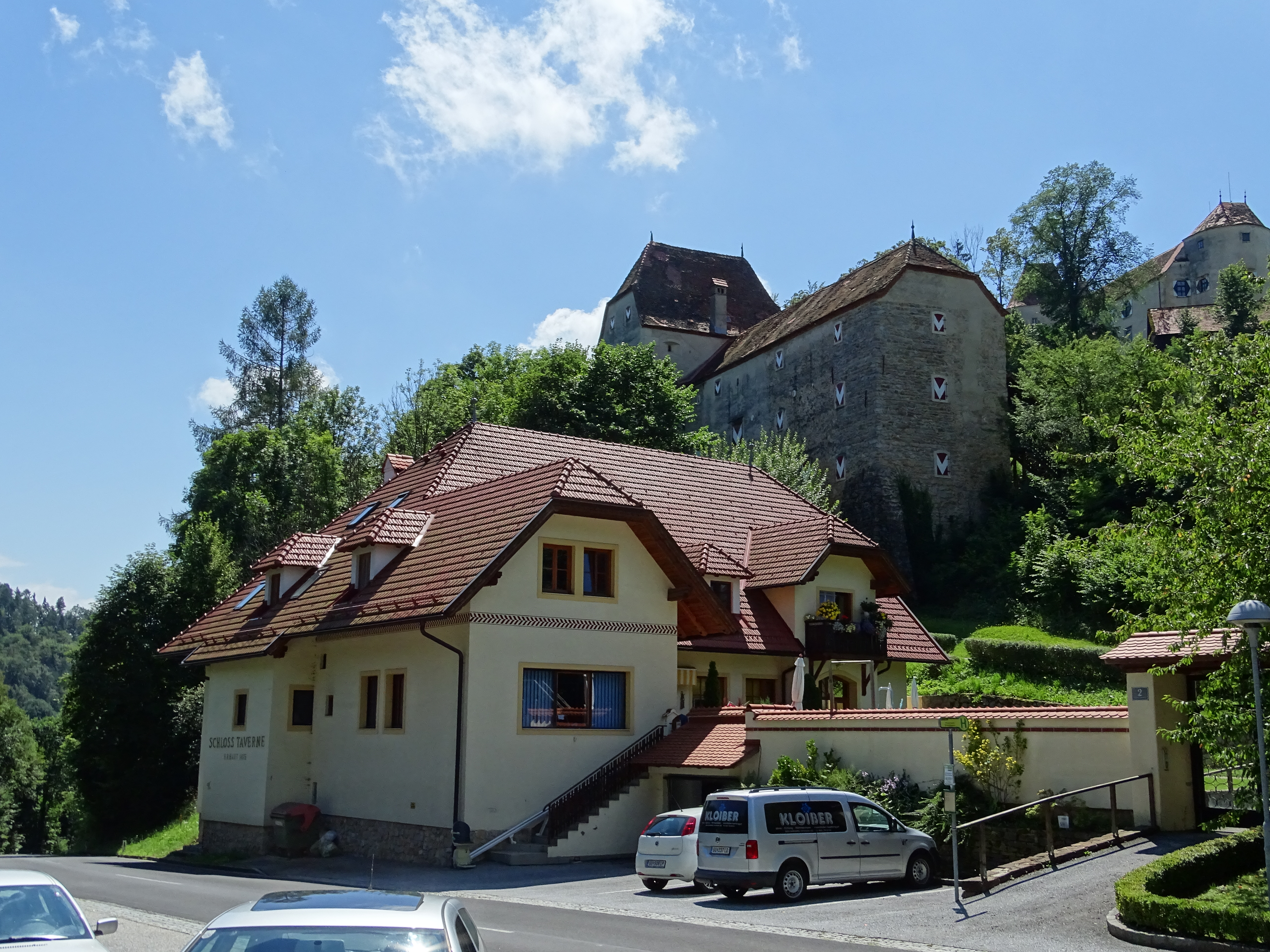 Blick die Ludwigsburg und die Schlosstaverne des Schlosses Plankenwarth in Sankt Oswald bei Plankenwarth